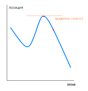 графика